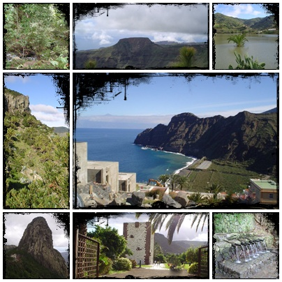 Chorros de Epina